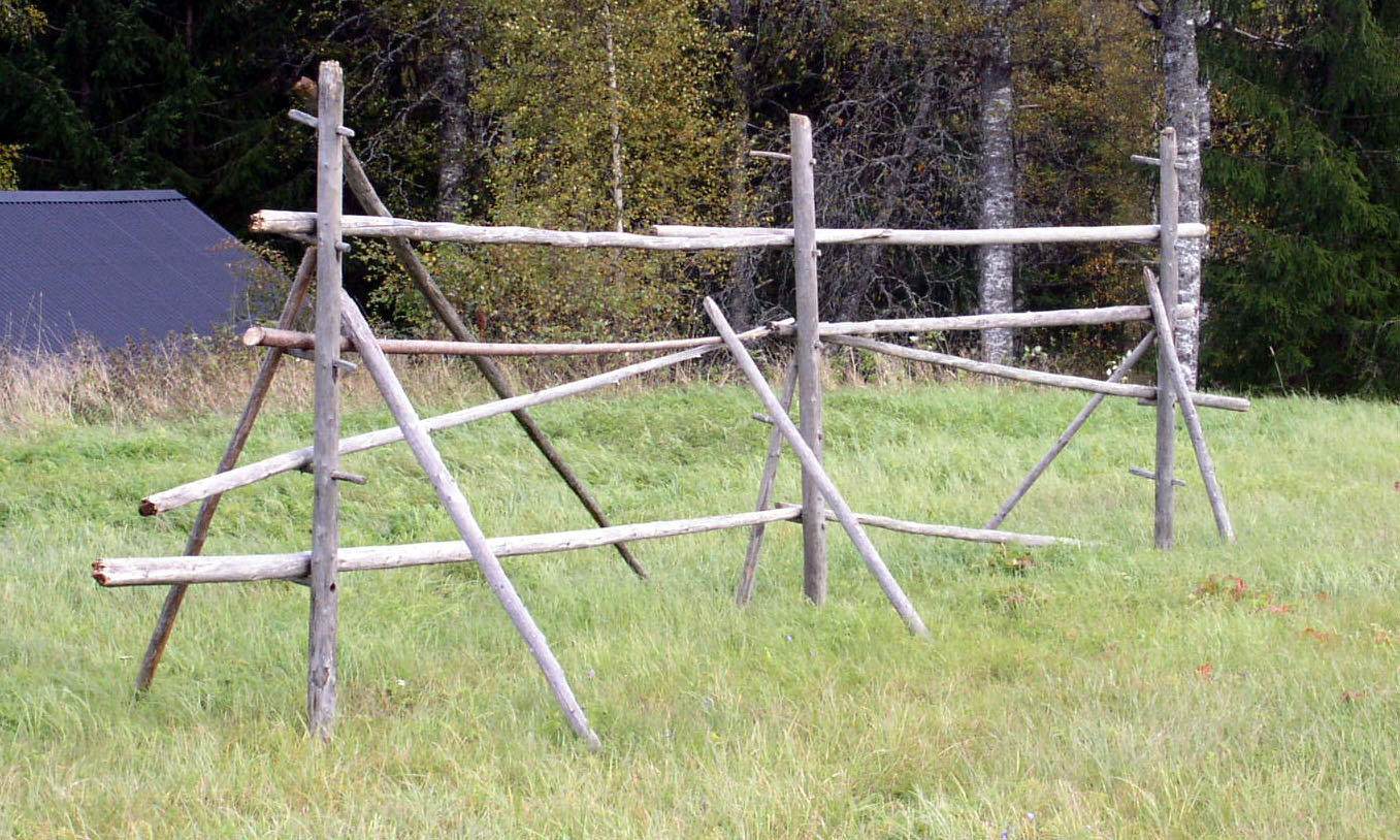 Tom höhässja i Gravendal, Ludvika kommun.